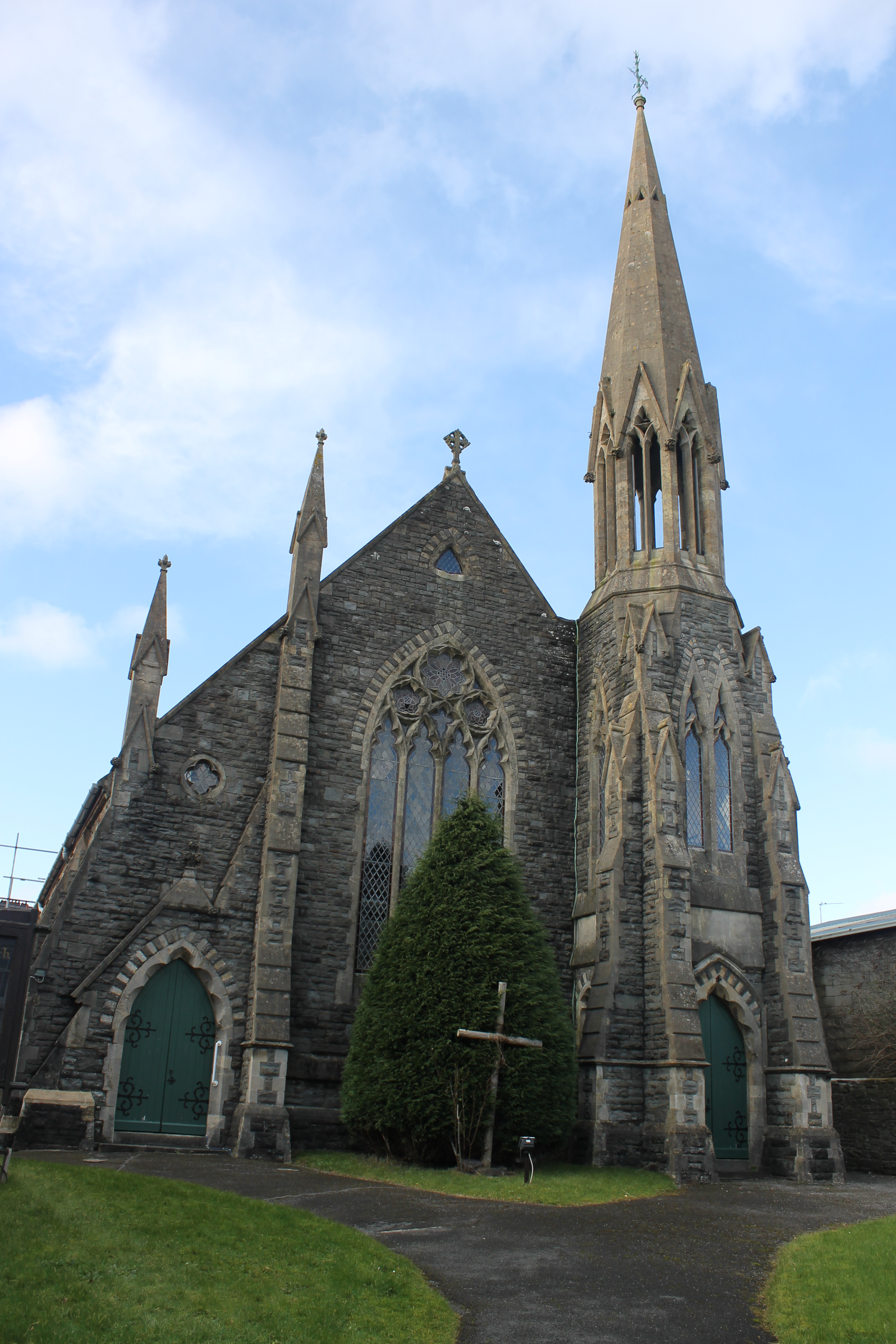 Eglwys Saesneg yng Nghaerfyrddin, De Cymru.